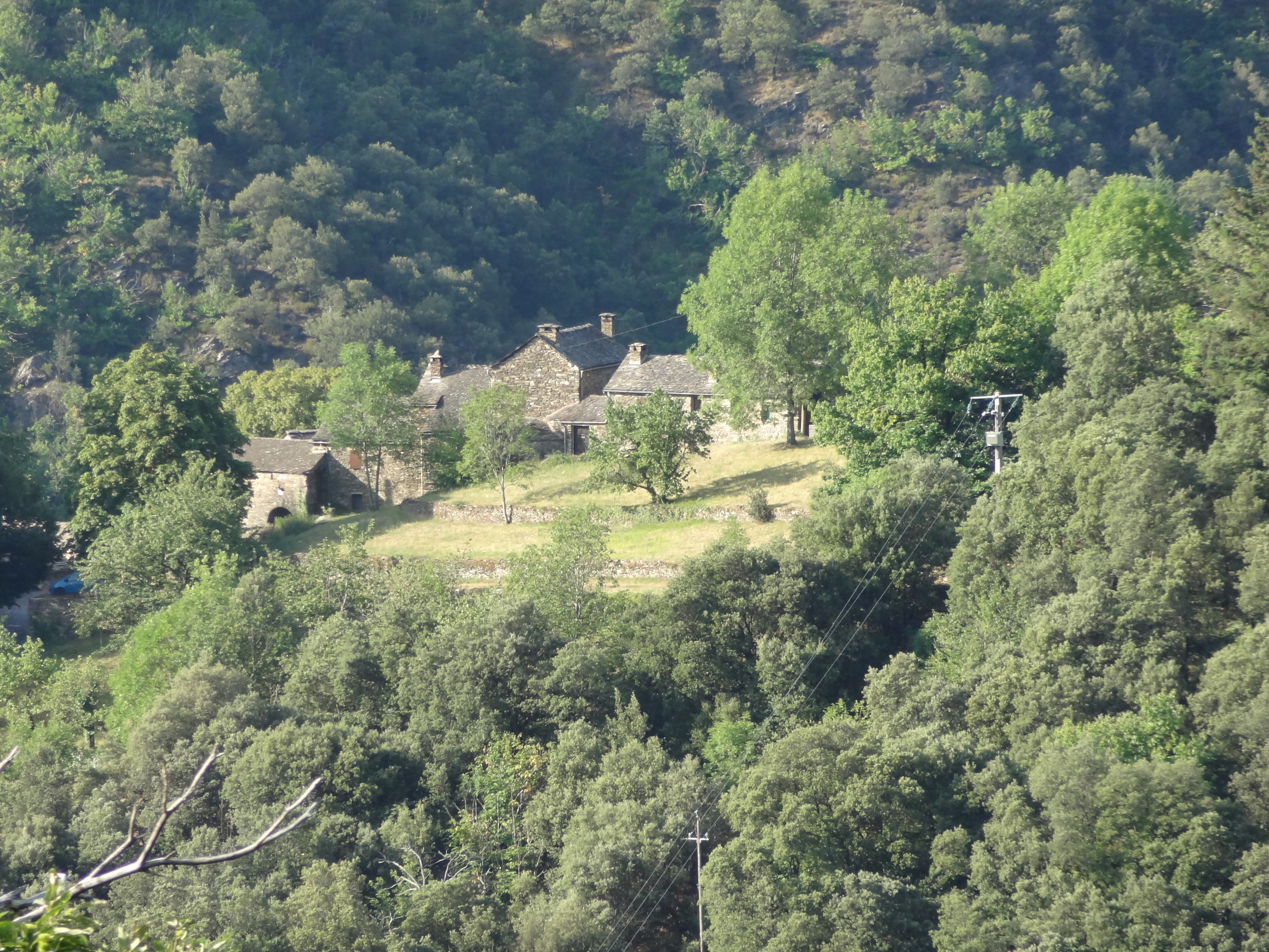 Le Viala vu depuis Poussiels (2011)